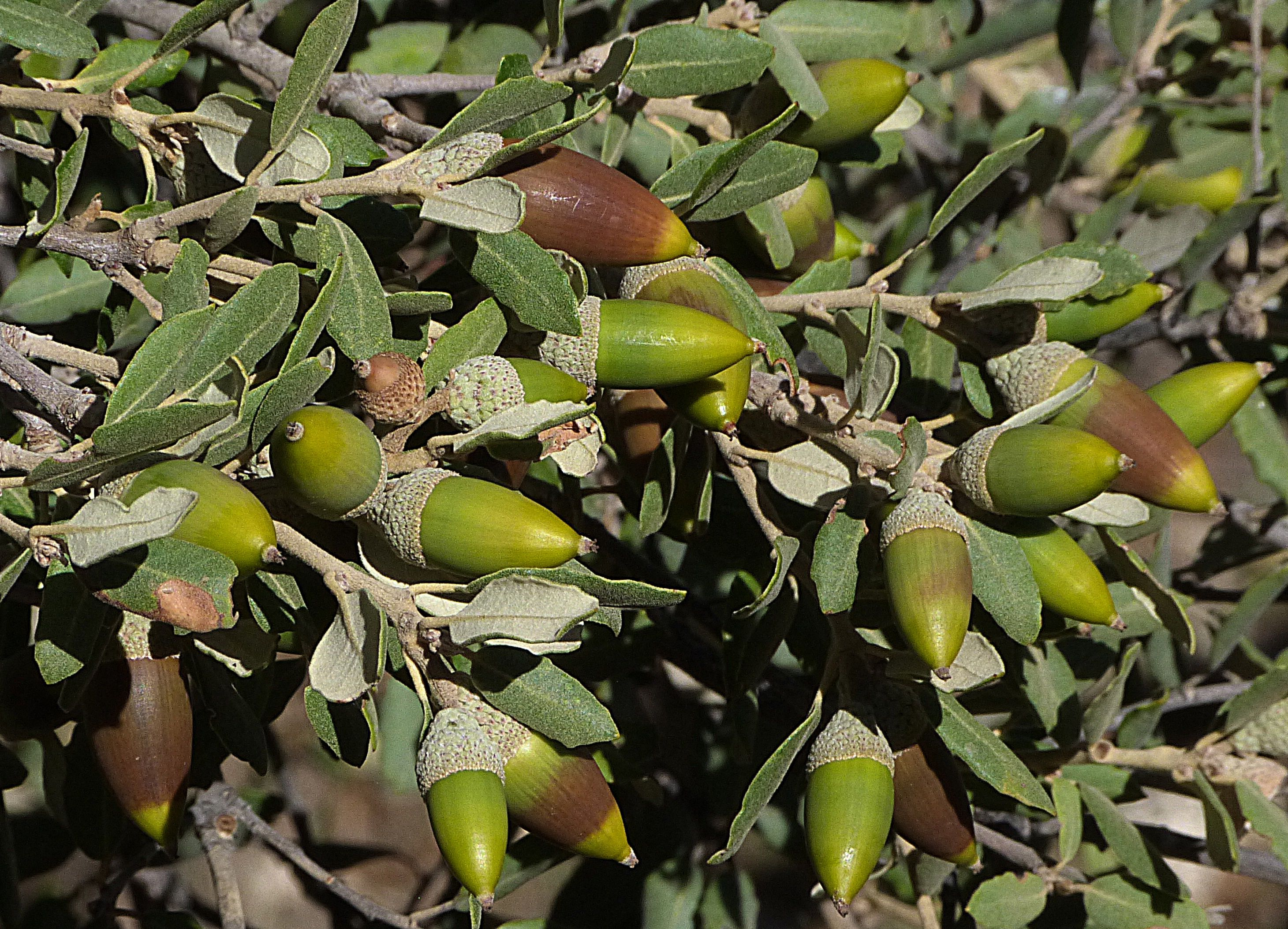 Quercus rotundifolia (PN Sierra de María-Los Vélez)